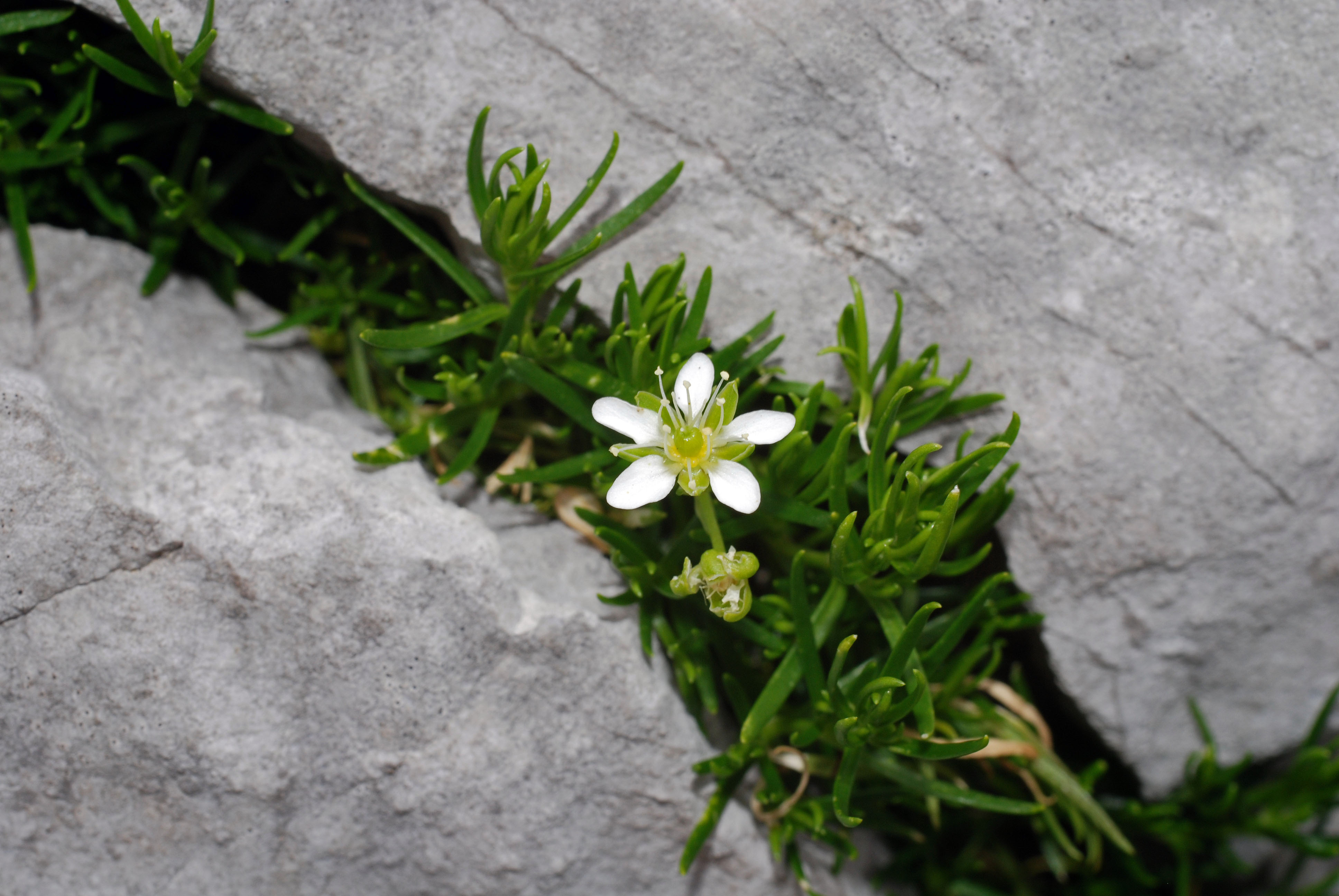 Moehringia ciliata, Near Welser Hütte, Totes Gebirge, Austria